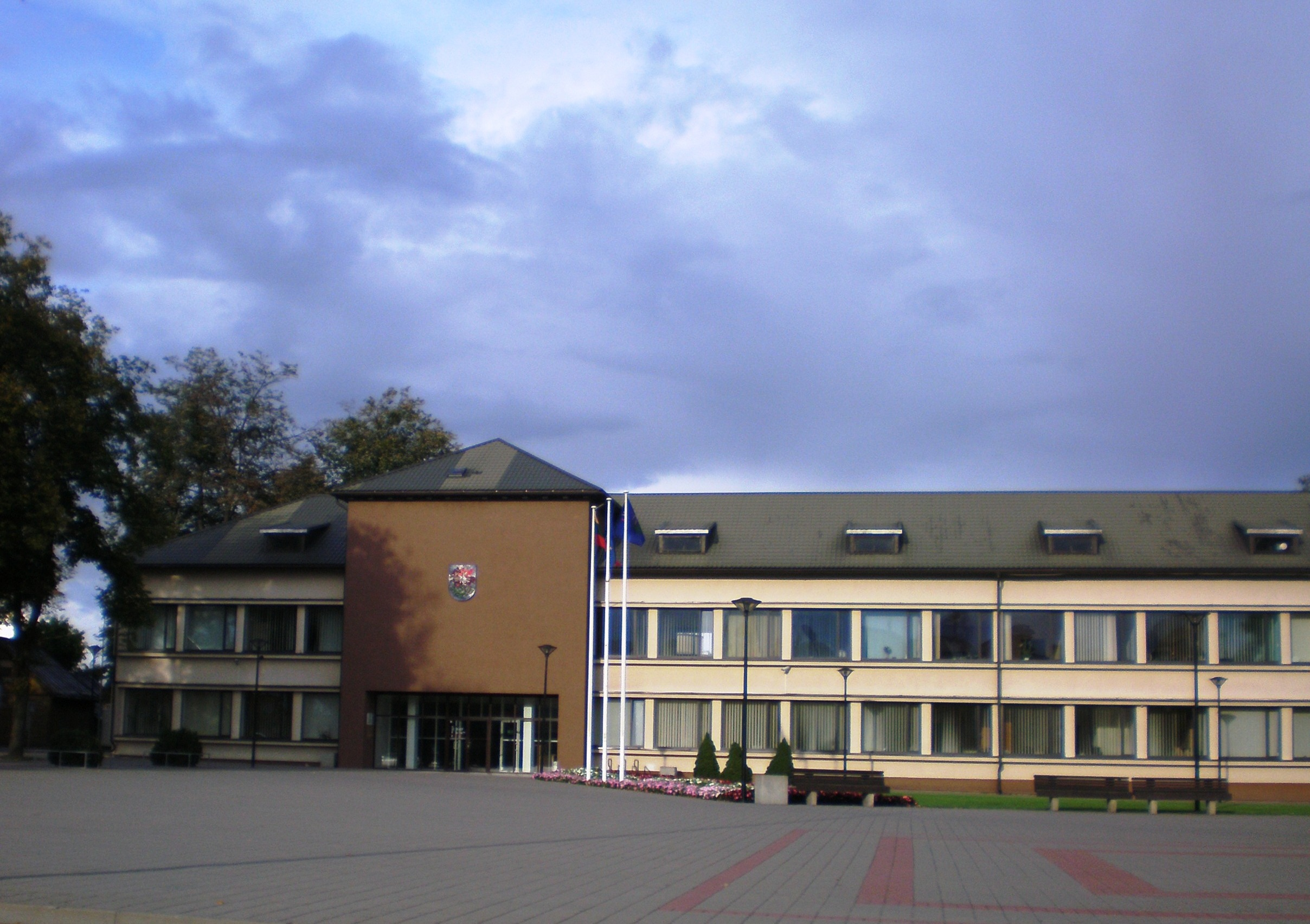 Prienai, rajono savivaldybė